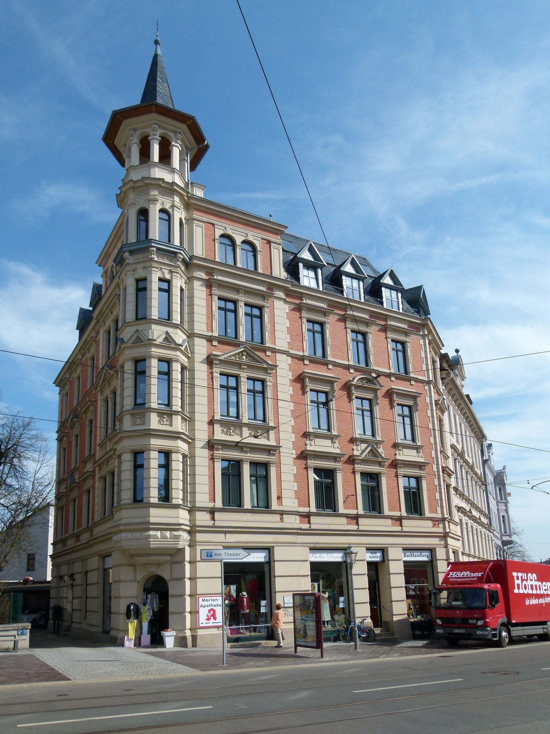 Denkmalgeschütztes Gebäude Neundorfer Straße 6, Plauen, Sachsen